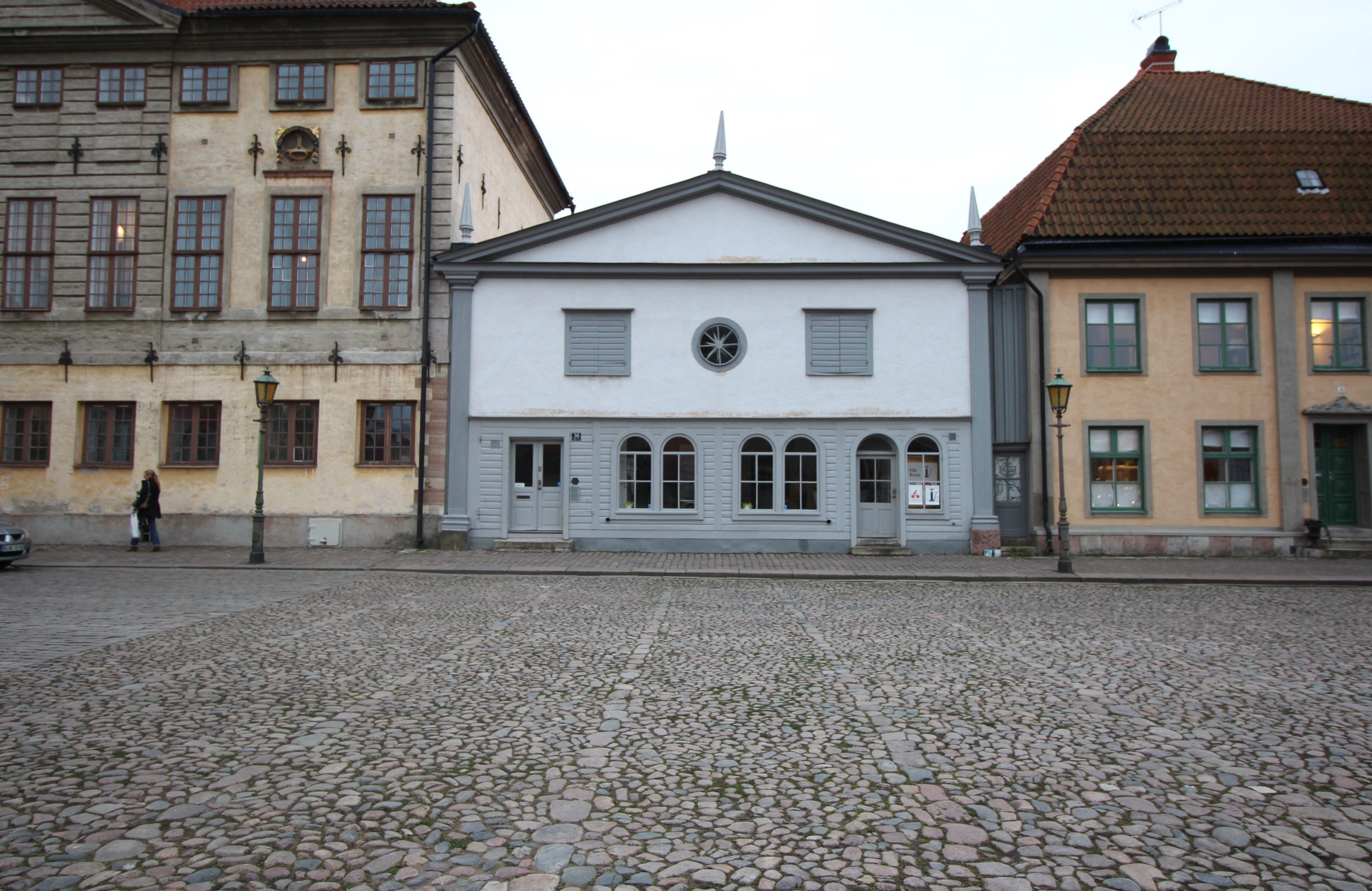 Gamla brandstationen vid Stortorget i Kalmar. 1760 beslutades att ett brandhus skulle anläggas. Efter renovering på 1830-talet fick brandstationen sitt nuvarande utseende. Huset är byggt i korsvirke och trä. Nya portar tillkomn 1889 inför att köttbesiktningsbyrån inrättades i huset. Husets vindsloft är i ursprungligt skick.